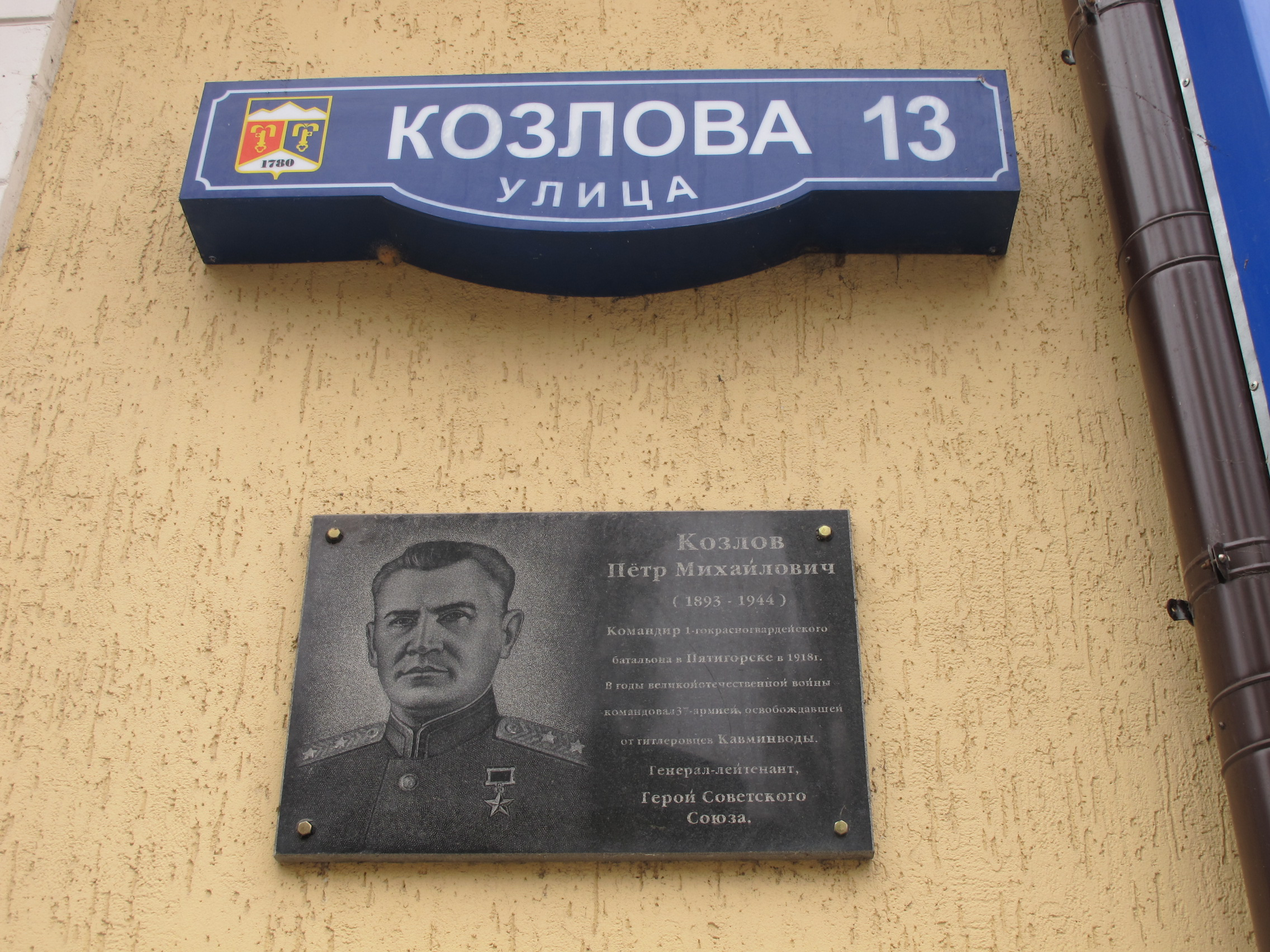 Улица Козлова (Пятигорск)